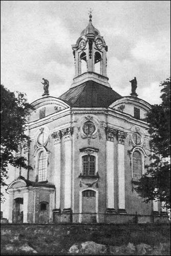 Касцёл на здымку да 1939 г.